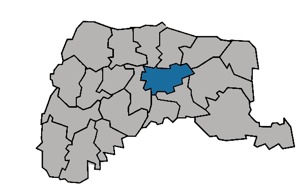 台灣省雲林縣虎尾鎮 KaurJmeb為編輯雲林縣zh:虎尾鎮所繪製